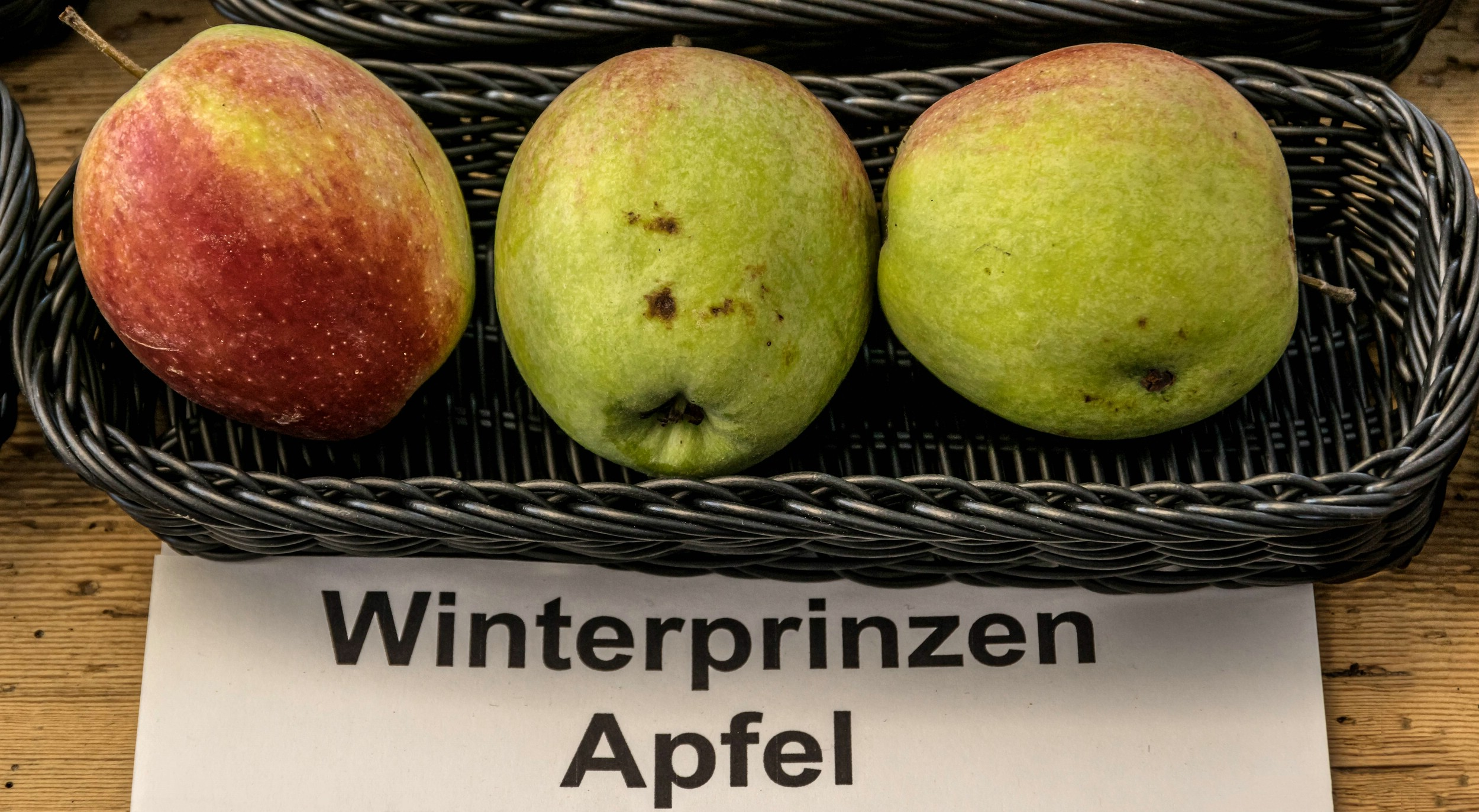 Alte Apfelsorten, von denen es im Badischen noch tragende Bäume gibt. Alle Aufnahmen au dem Oktober 2015